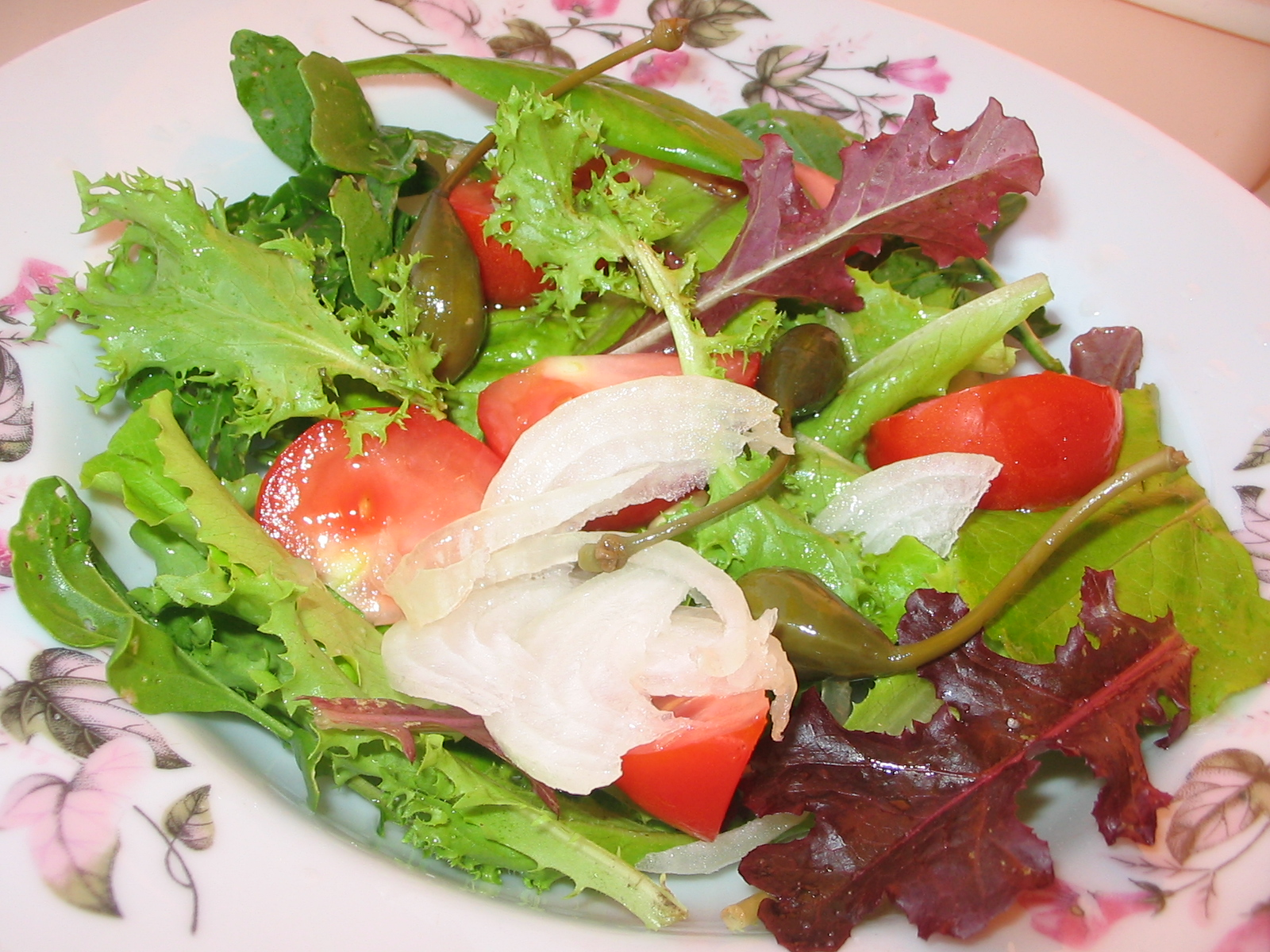 овочевий салат. холодна закуска